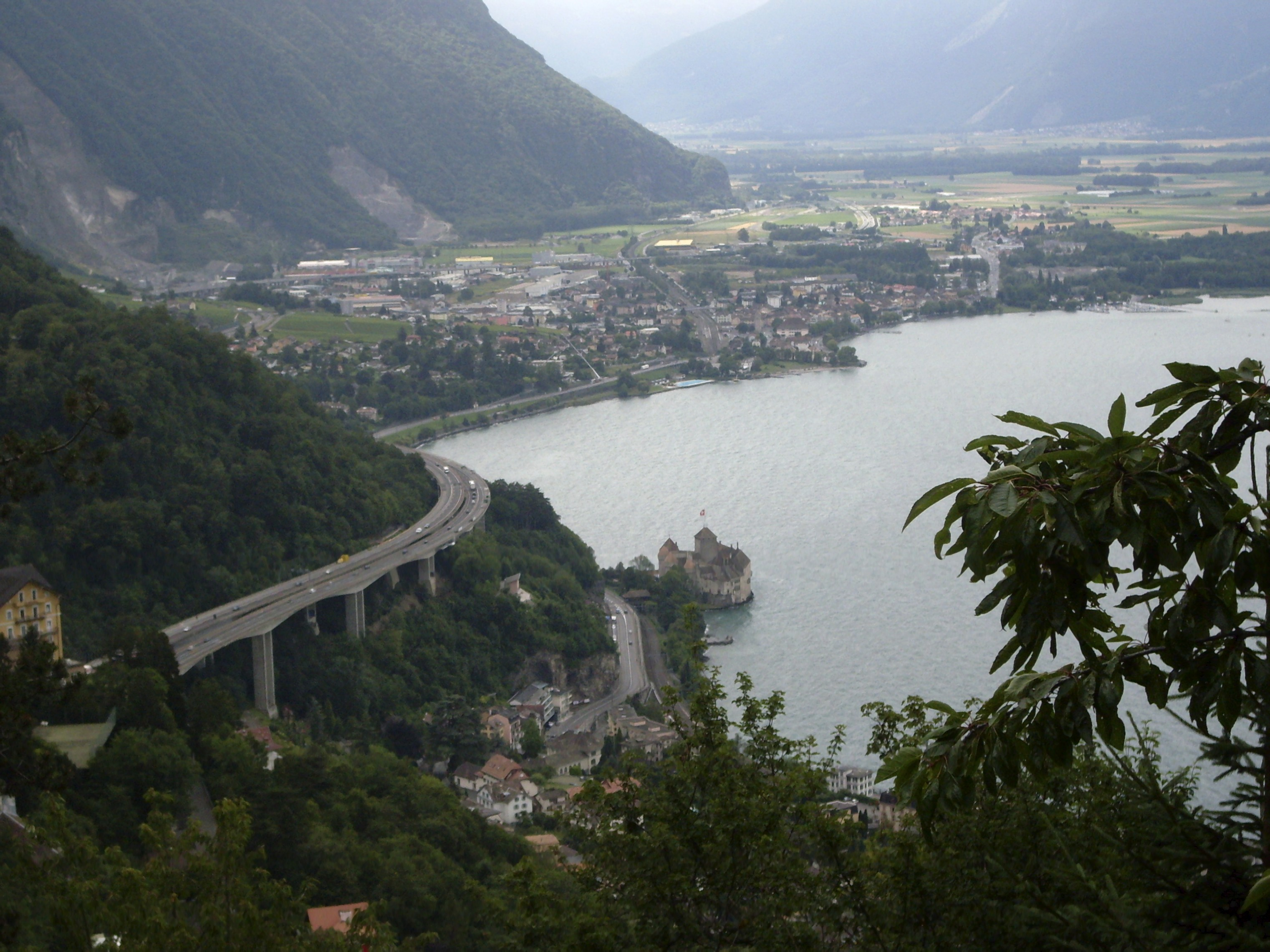 Der Genfer See von Glion aus, Schweiz